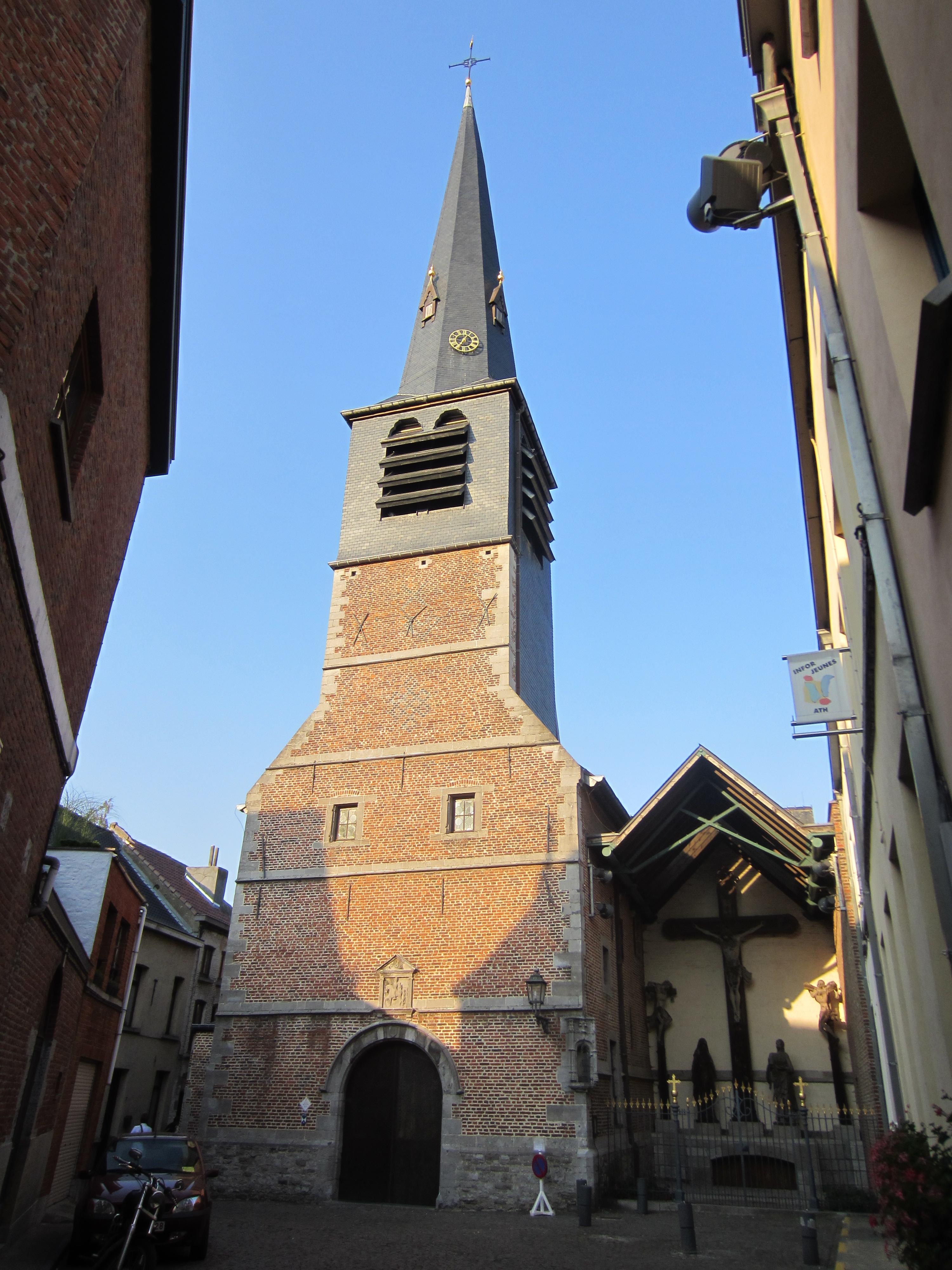 Façade avant de l'église Saint-Martin et le calvaire attenant